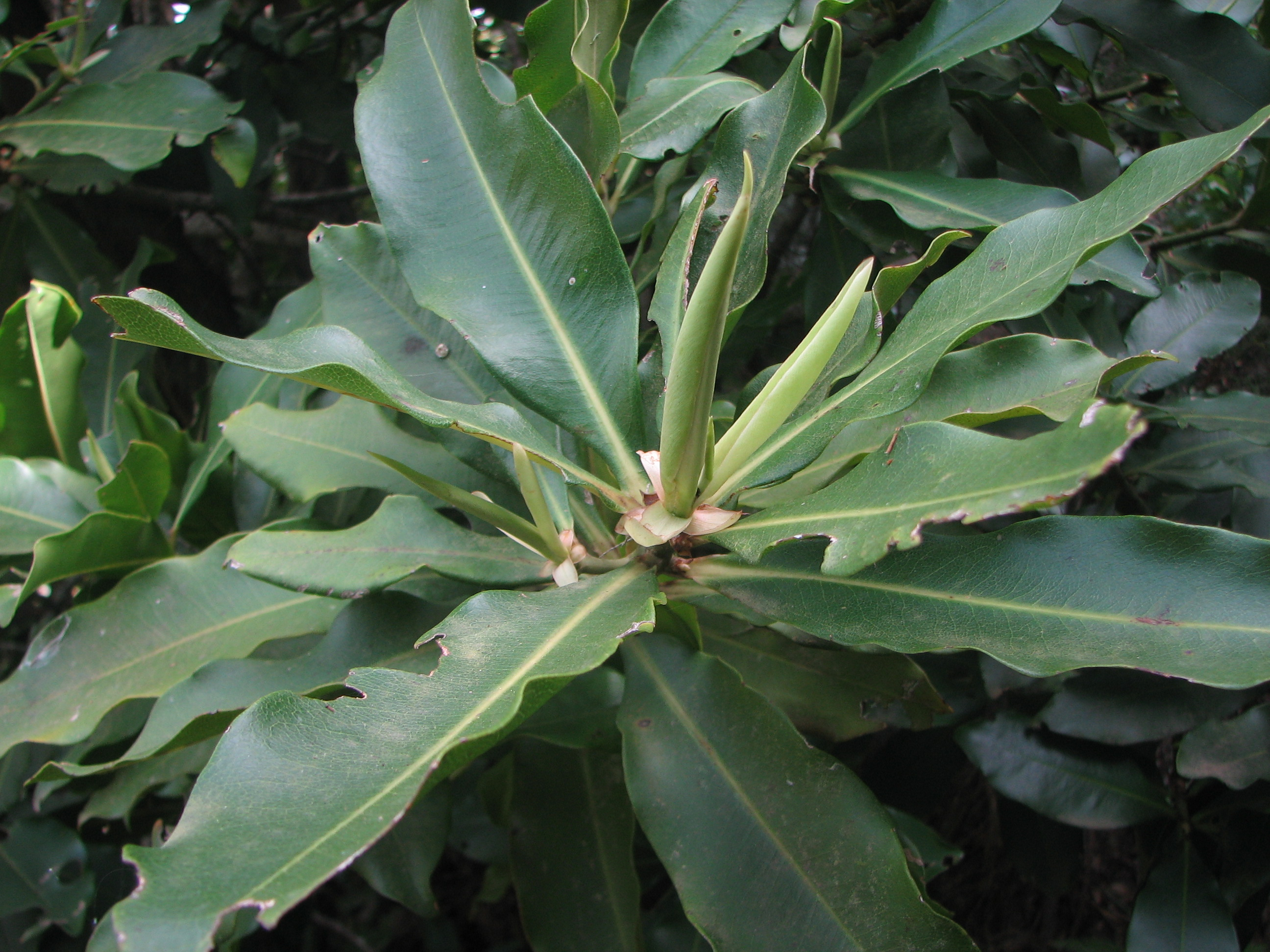 Marmulán o Delfino (Pleiomeris canariensis). Monte de Anaga, Tenerife.